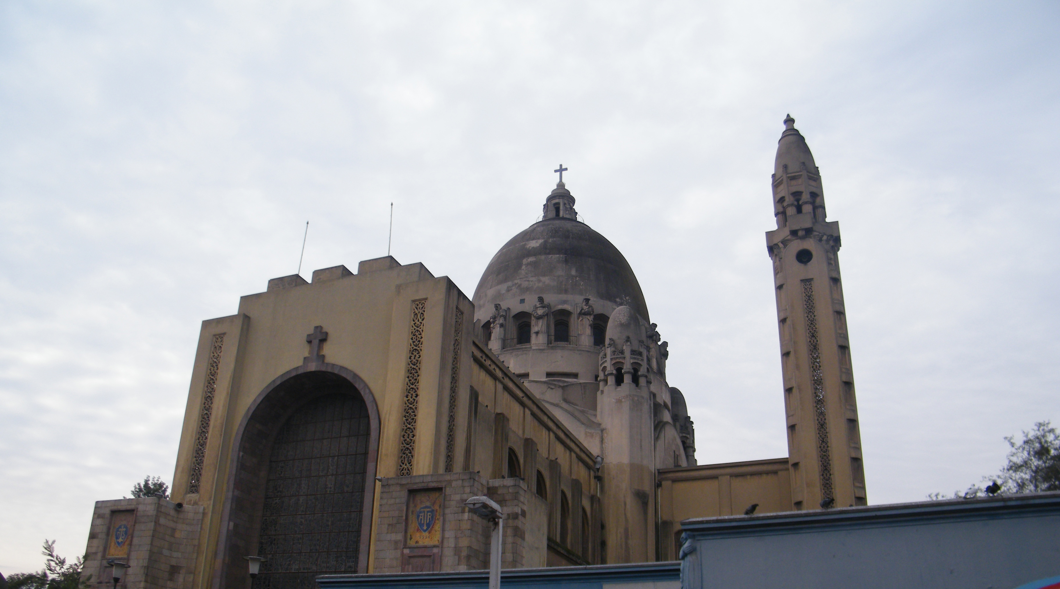 Fotografias del Santuario de Lourdes, incluyen imágenes de la Basílica, Gruta y Convento